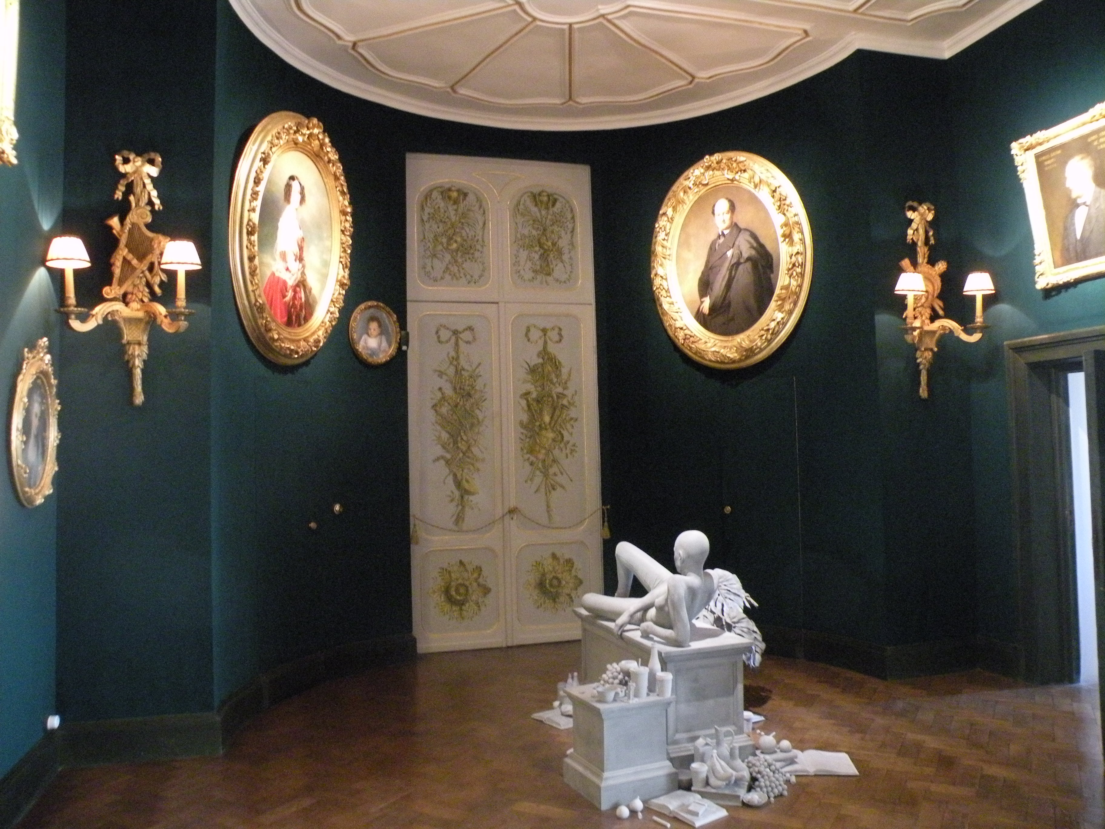 chateau de Chimay - salon des portraits